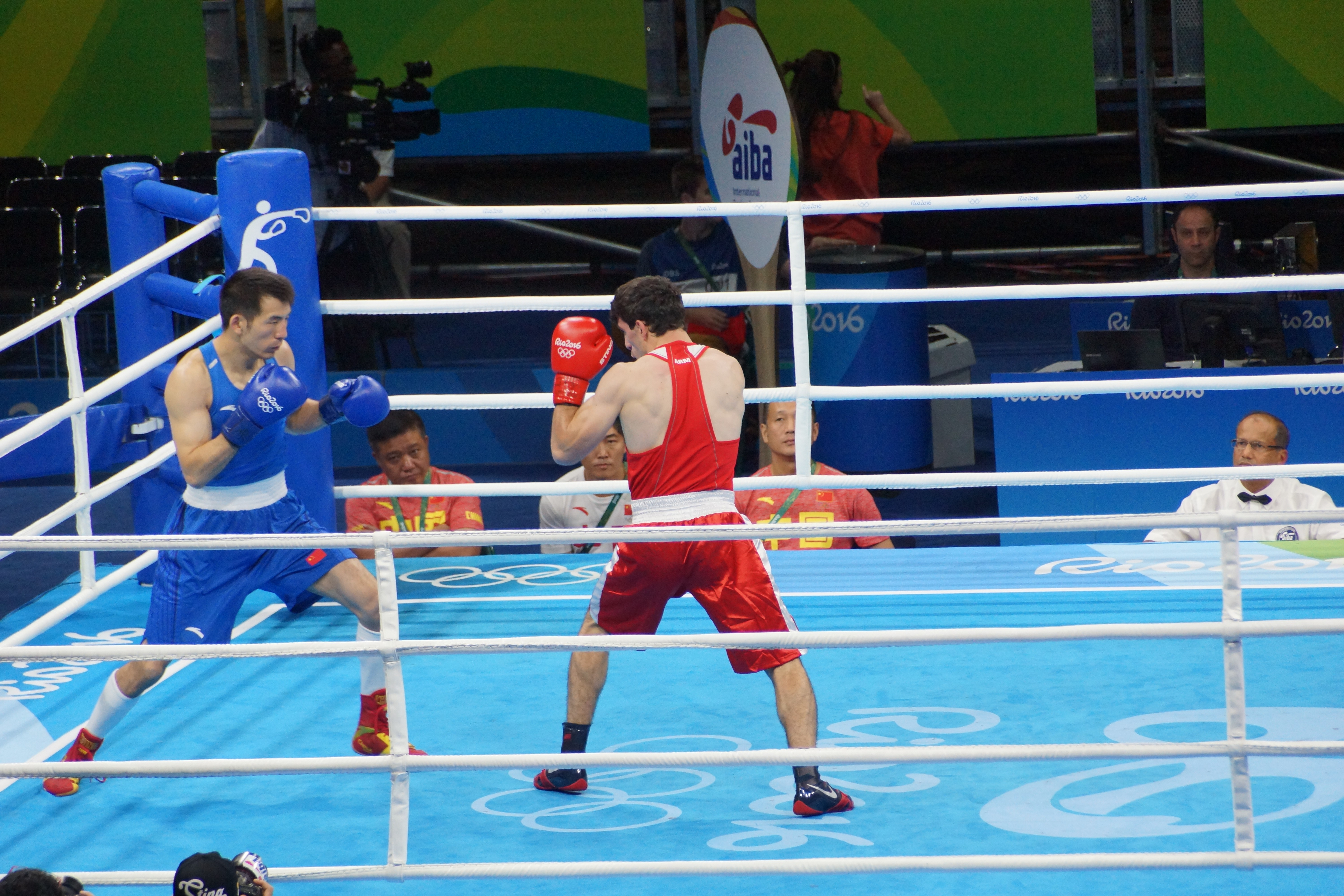 slt.a-77